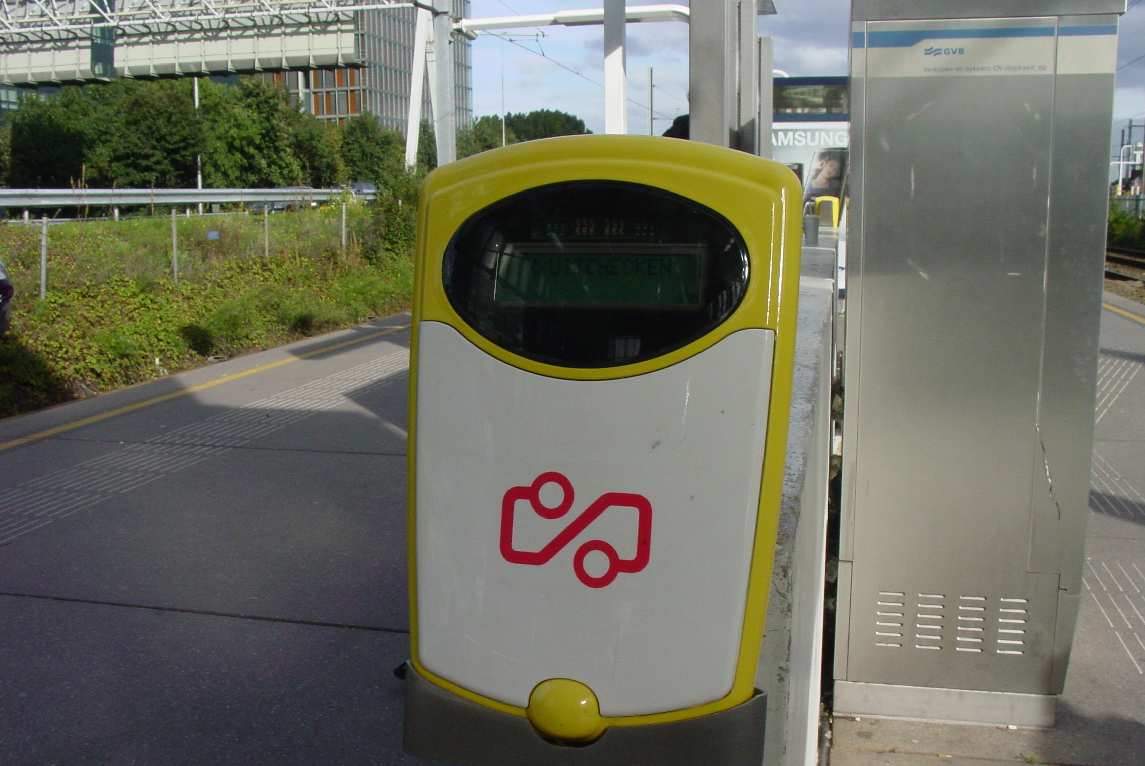 De OV-chipkaart lezer op Station Amsterdam Zuid.